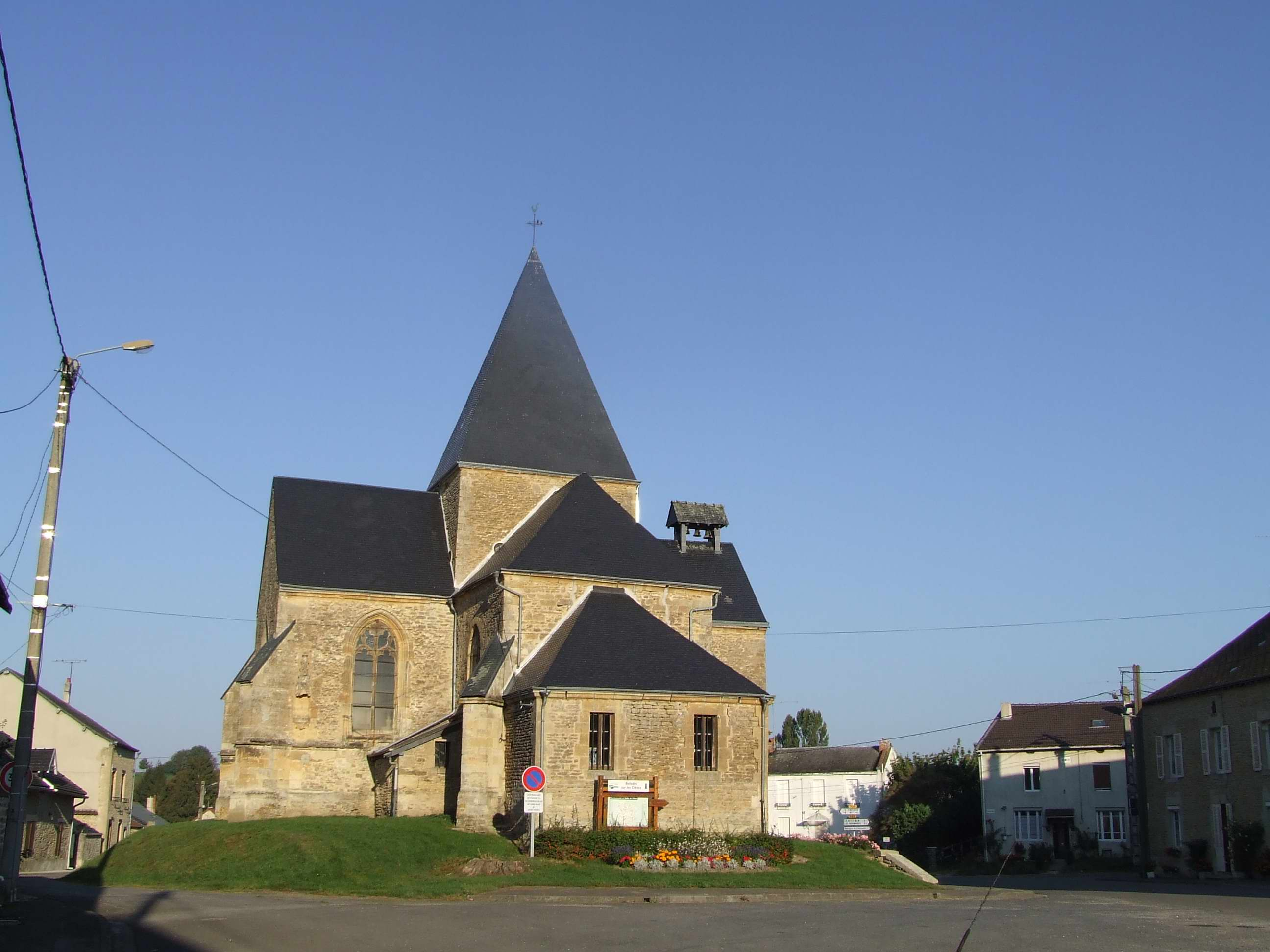 Eglise d'Ecordal 08130 Ardennes